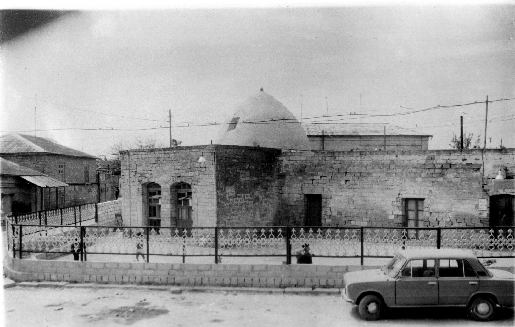 on gorunus